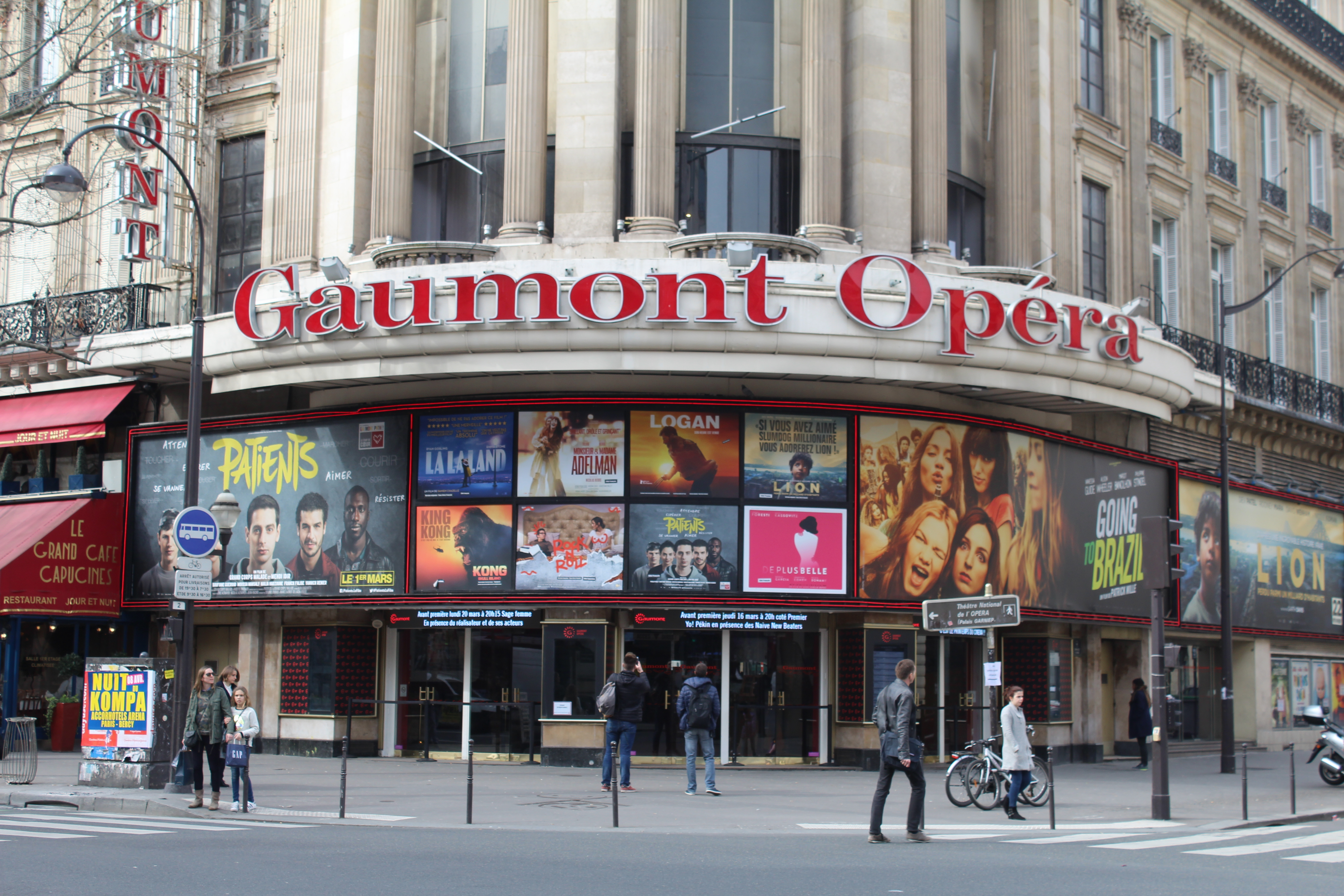 Gaumont-Opéra à Paris.